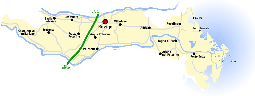 Kaart van de provincie Rovigo